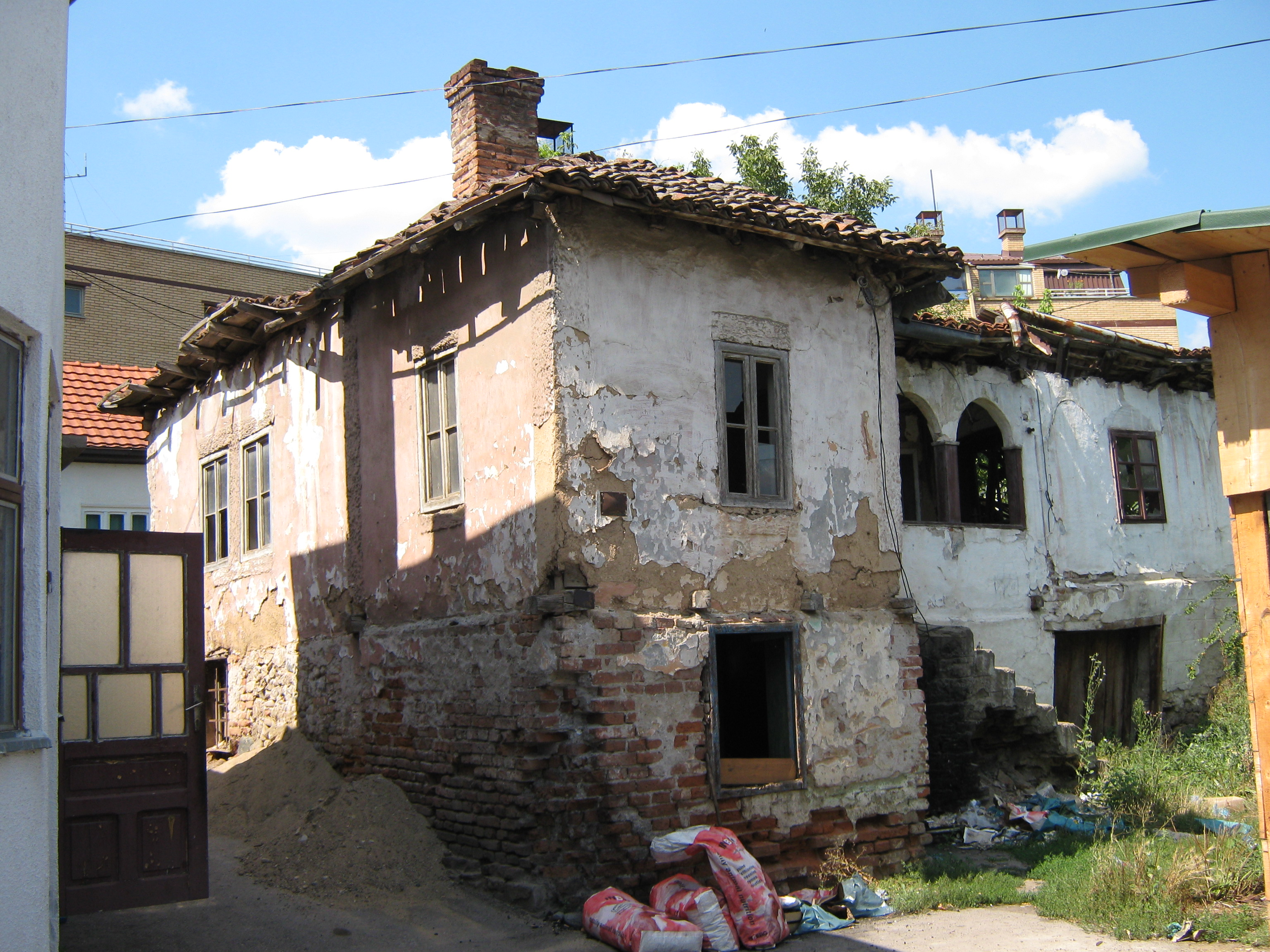 Стара кућа у Кушумлији.